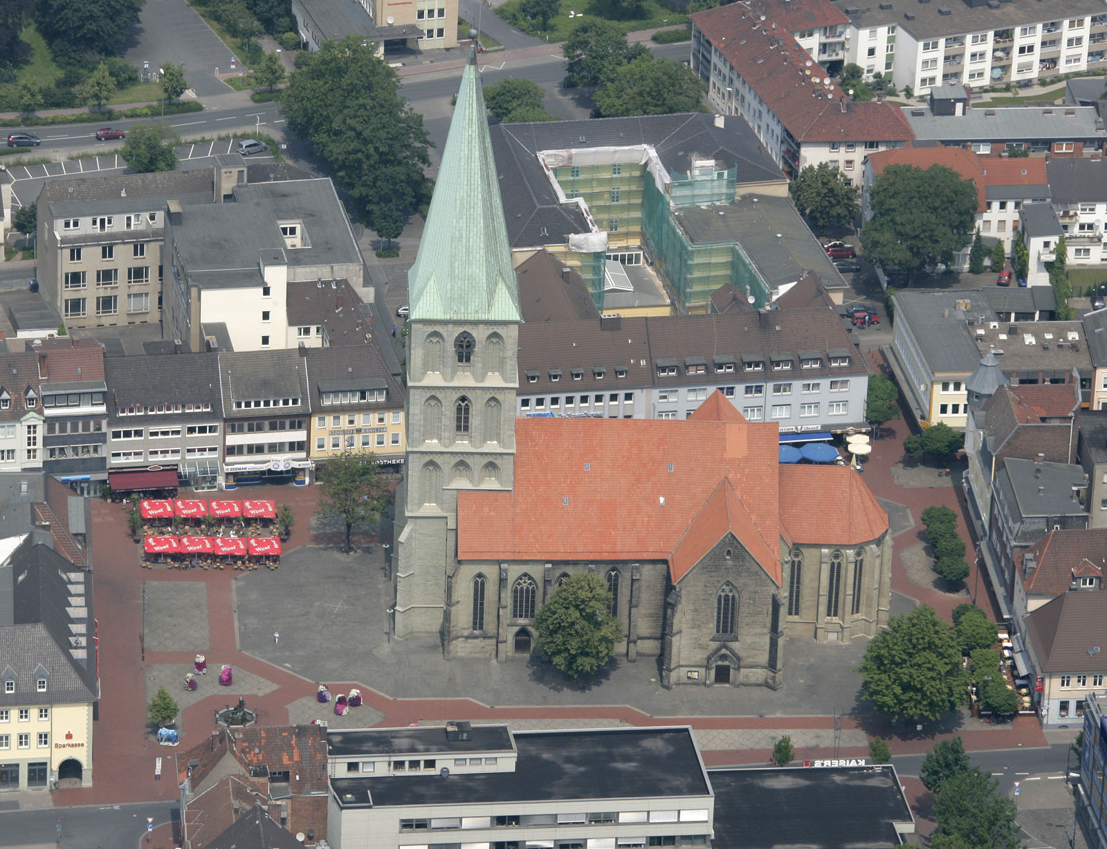 Luftbildaufnahme Hamm: Pauluskirche und Marktplatz